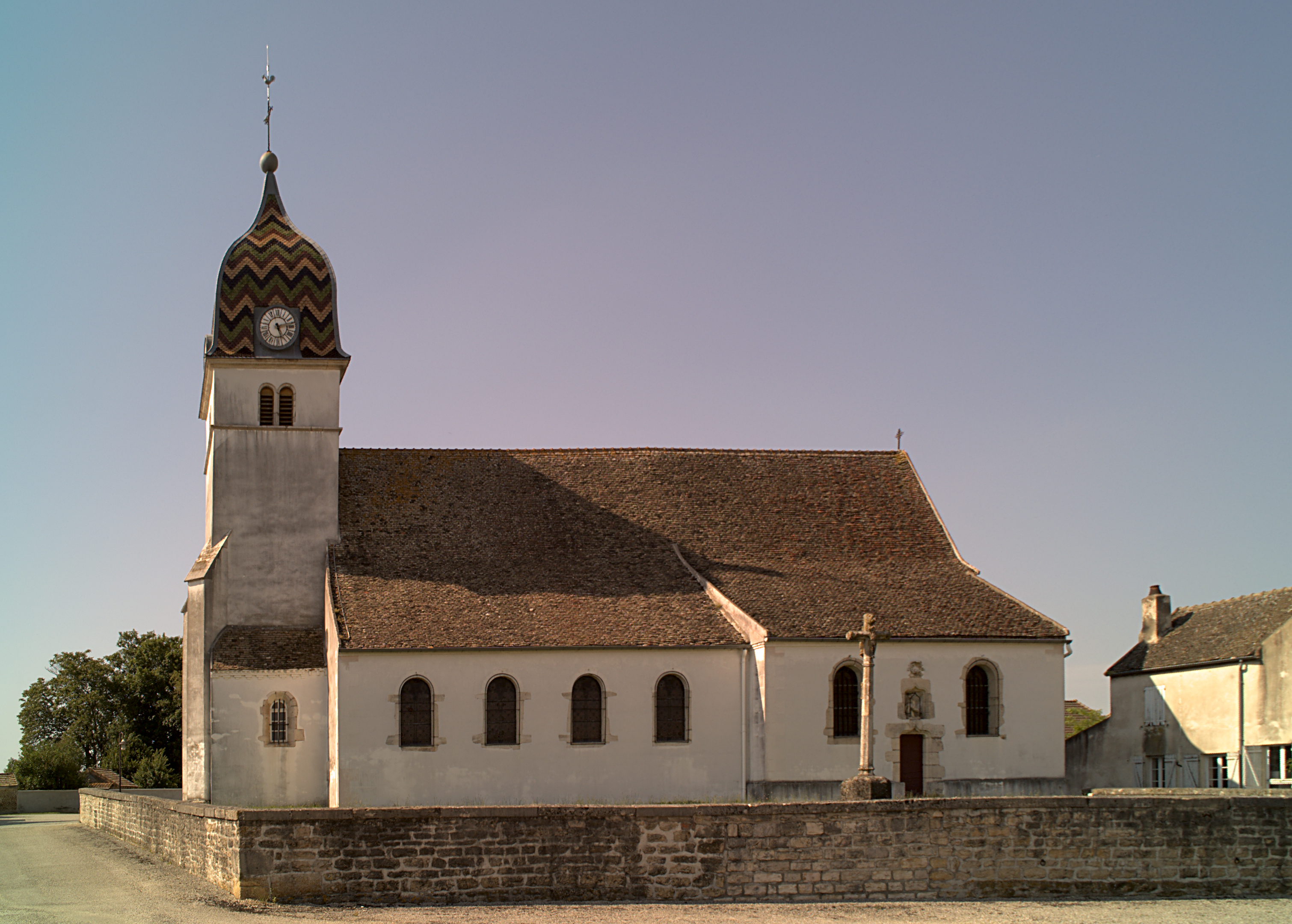 Église paroissiale Saint-Grégoire-le-Grand, Charnay-lès-Chalon (Saône-et-Loire, Bourgogne, France)